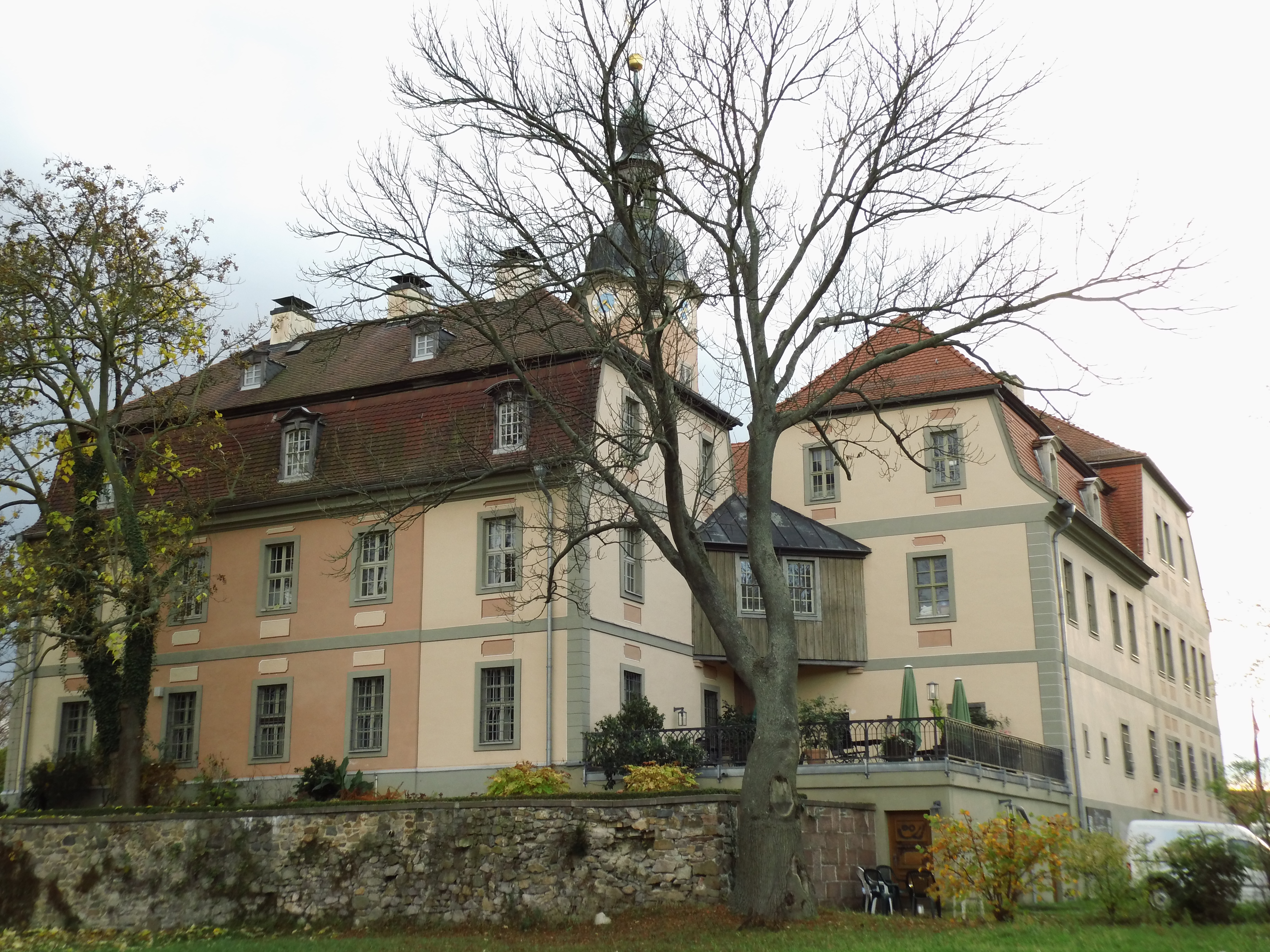 Das Schloss von nordöstlicher Seite